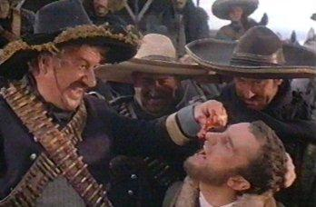 Django (részlet)